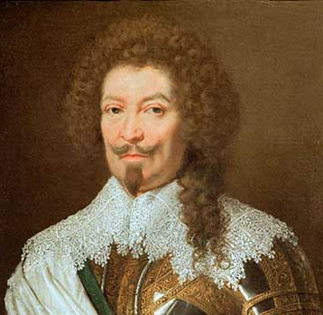 recadrage de File:Justus Sustermans 013.jpg